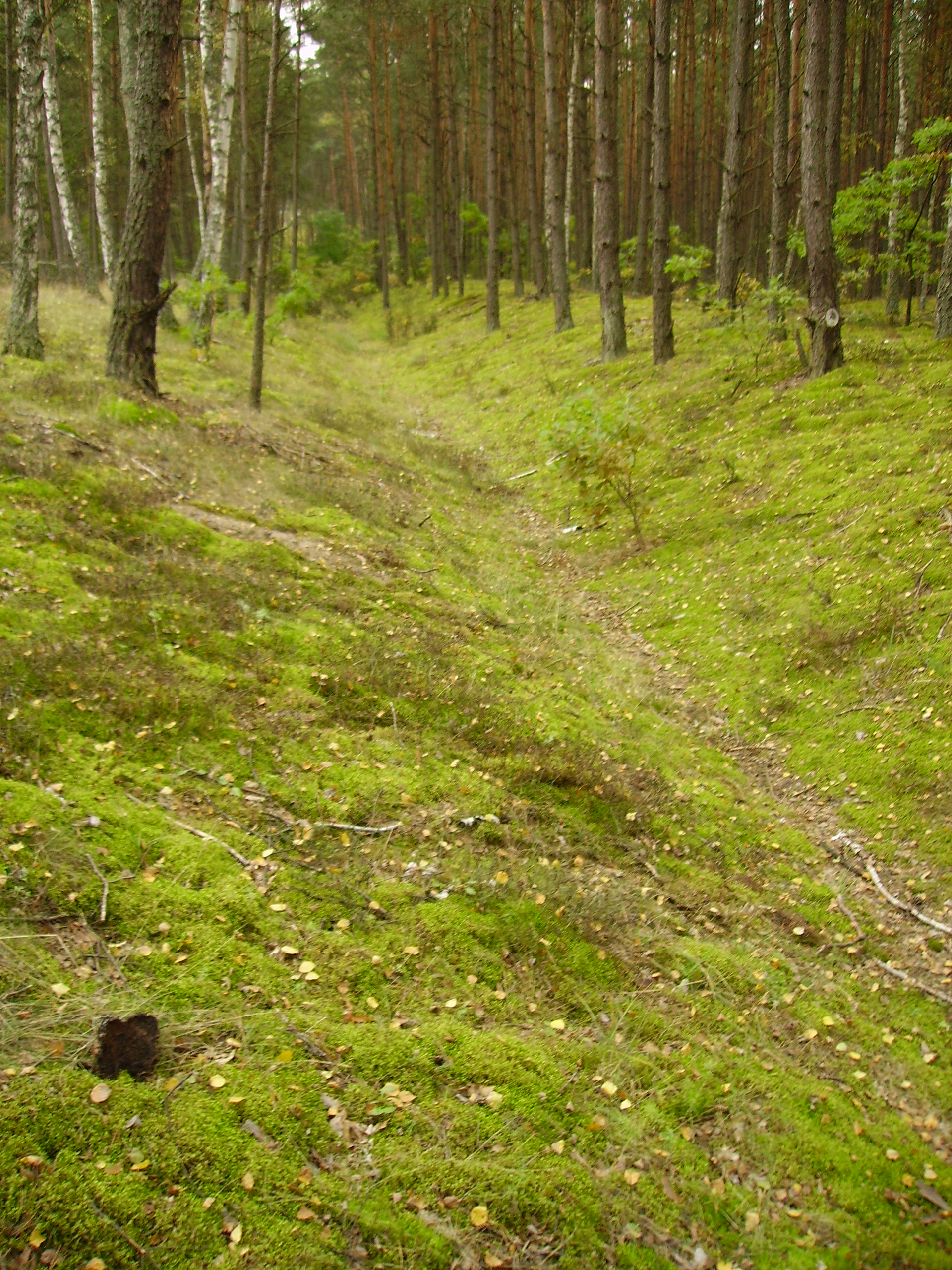 Przedmoście Warszawskie, rów przeciwczołgowy w okolicach Dąbrowieckiej Góry